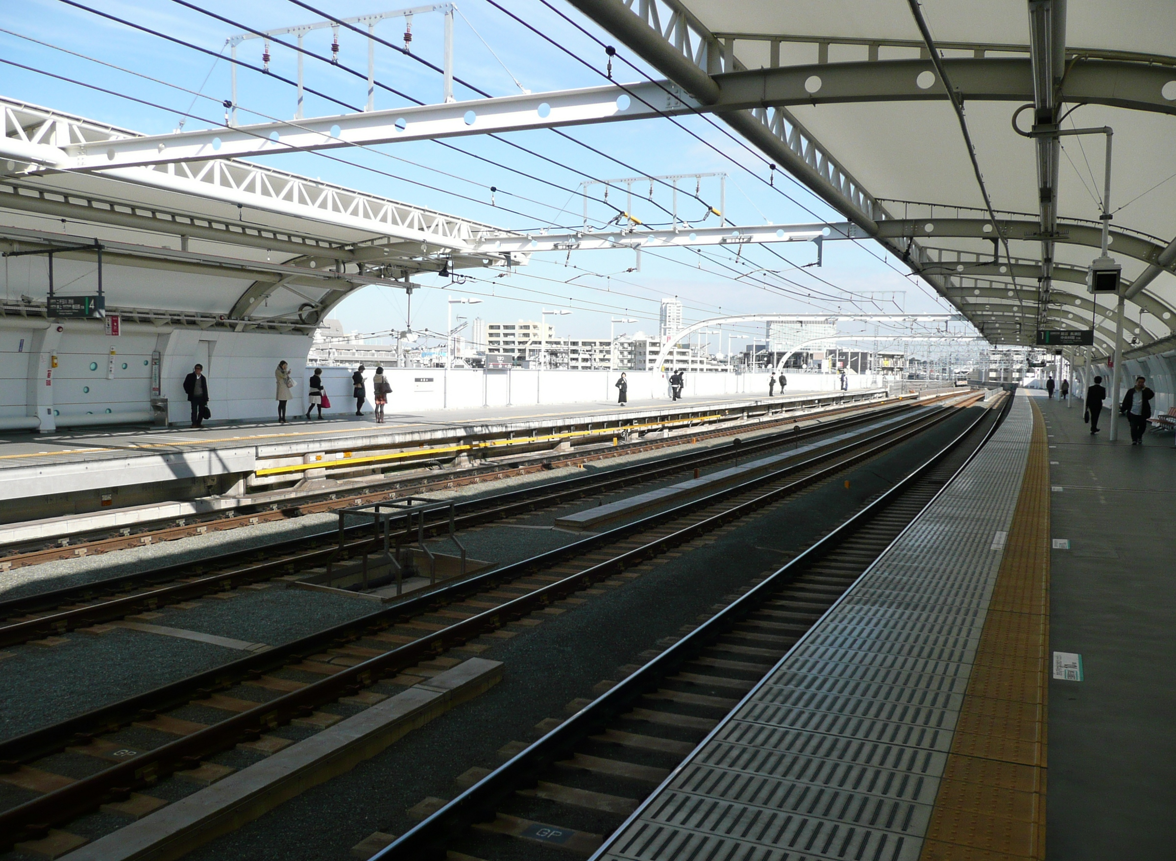 高津駅ホーム